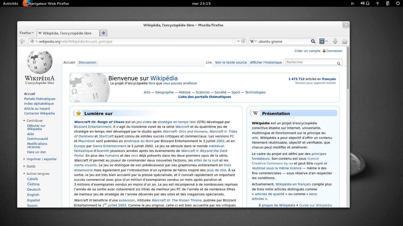 Ubuntu GNOME 13.10